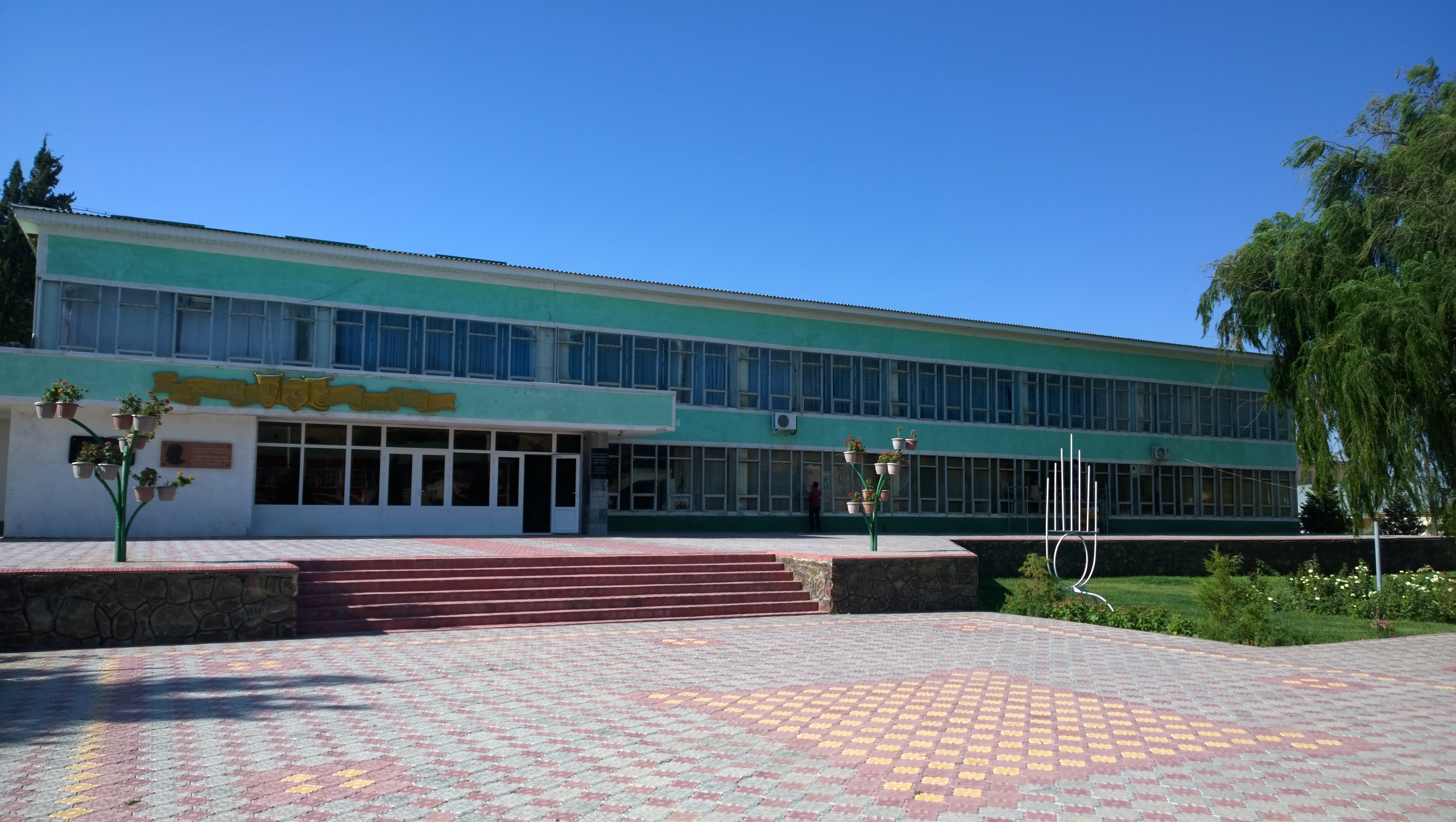 Тоҷикӣ: Қасри фарҳанги ноҳияи Файзобод